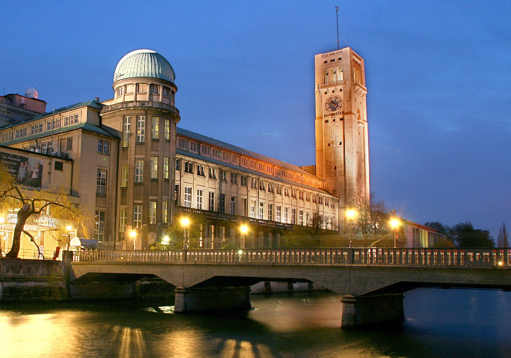 Museumsinsel, Deutsches Museum, München